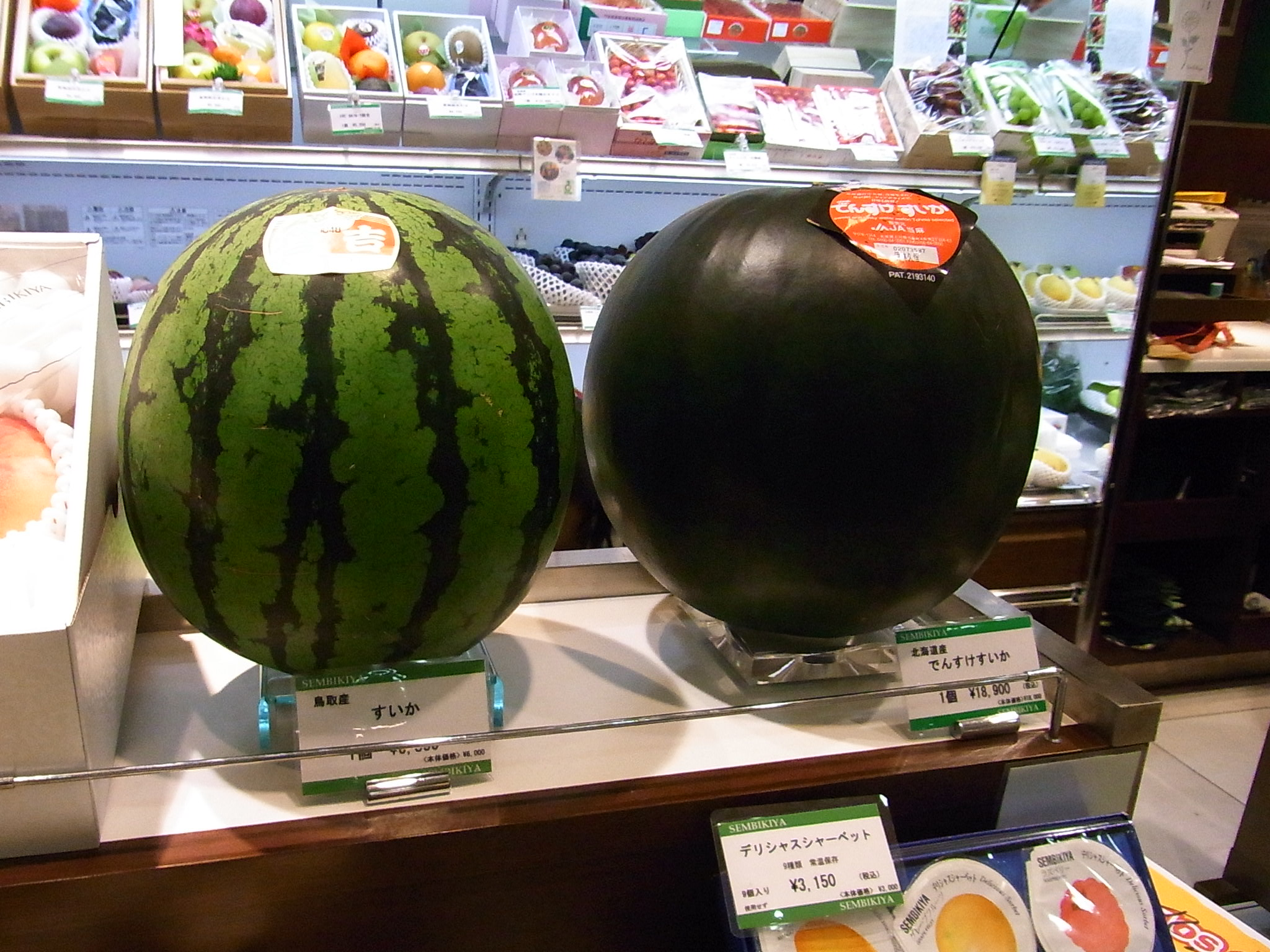 でんすけ西瓜